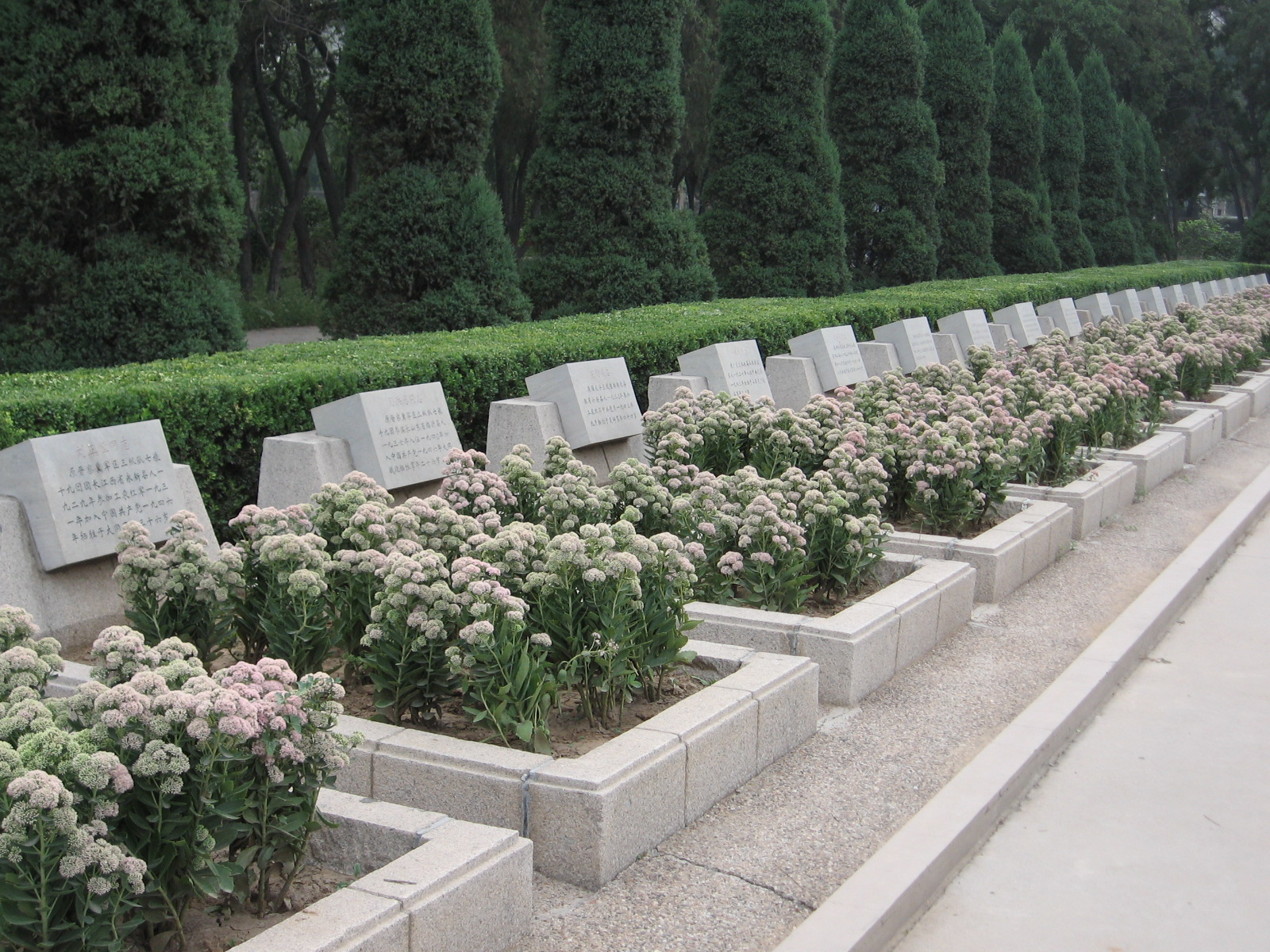 中国河北石家庄华北军区烈士陵园烈士墓群。